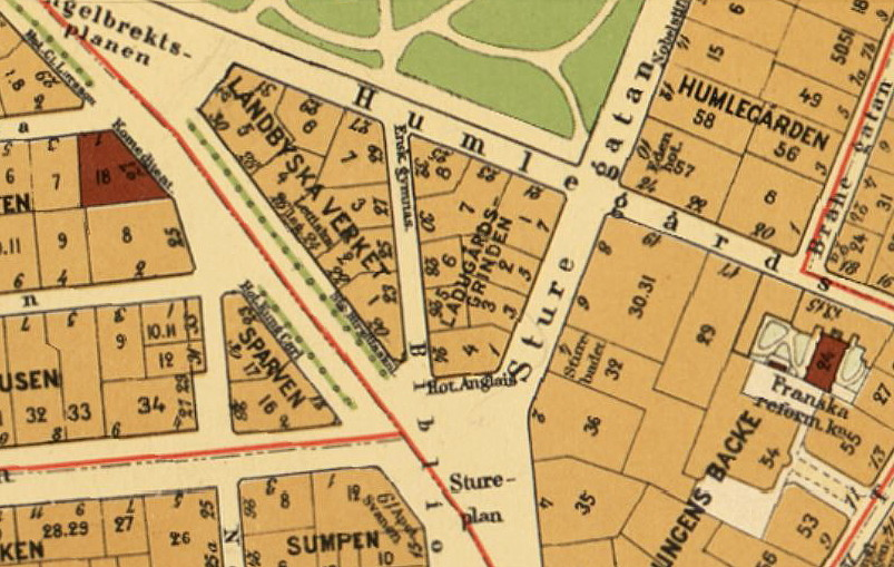 Del av Stockholmskarta visande kvarteren Ladugårdsgrinden, Landbyska verket och Engelbrektspaln.